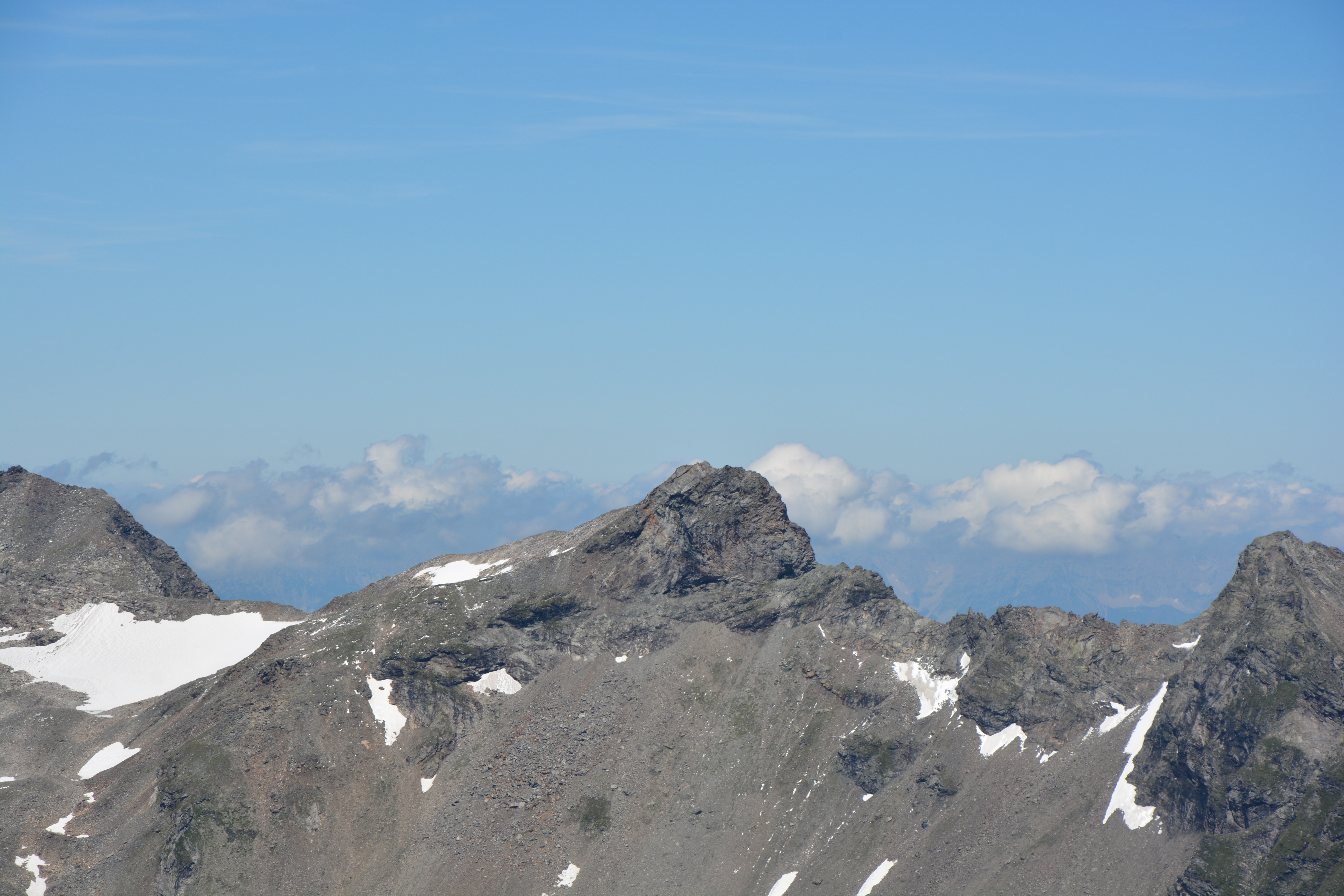 Rote Säule gesehen vom Wildenkogel.